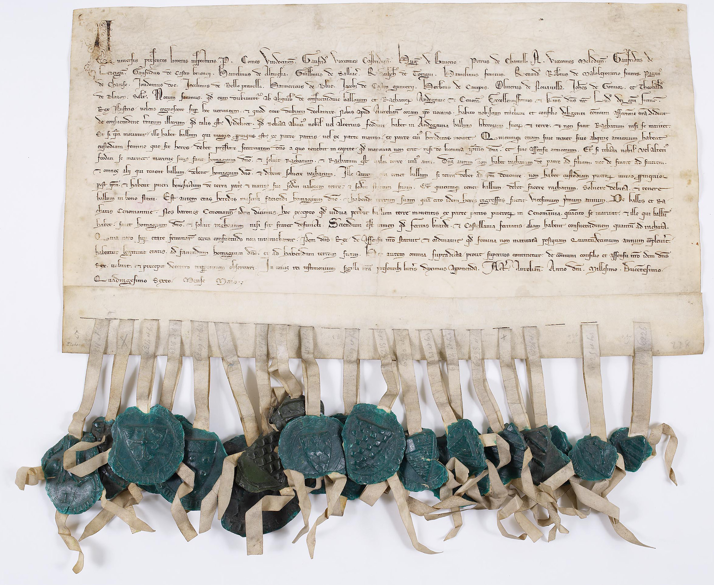 Déclaration de la noblesse de l’Anjou et du Maine précisant à la demande de Saint Louis certains articles de la coutume féodale. Orléans, mai 1246